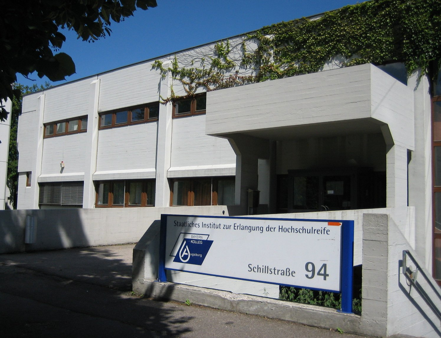 Bayernkolleg in Augsburg, Eingang an der Schillstraße